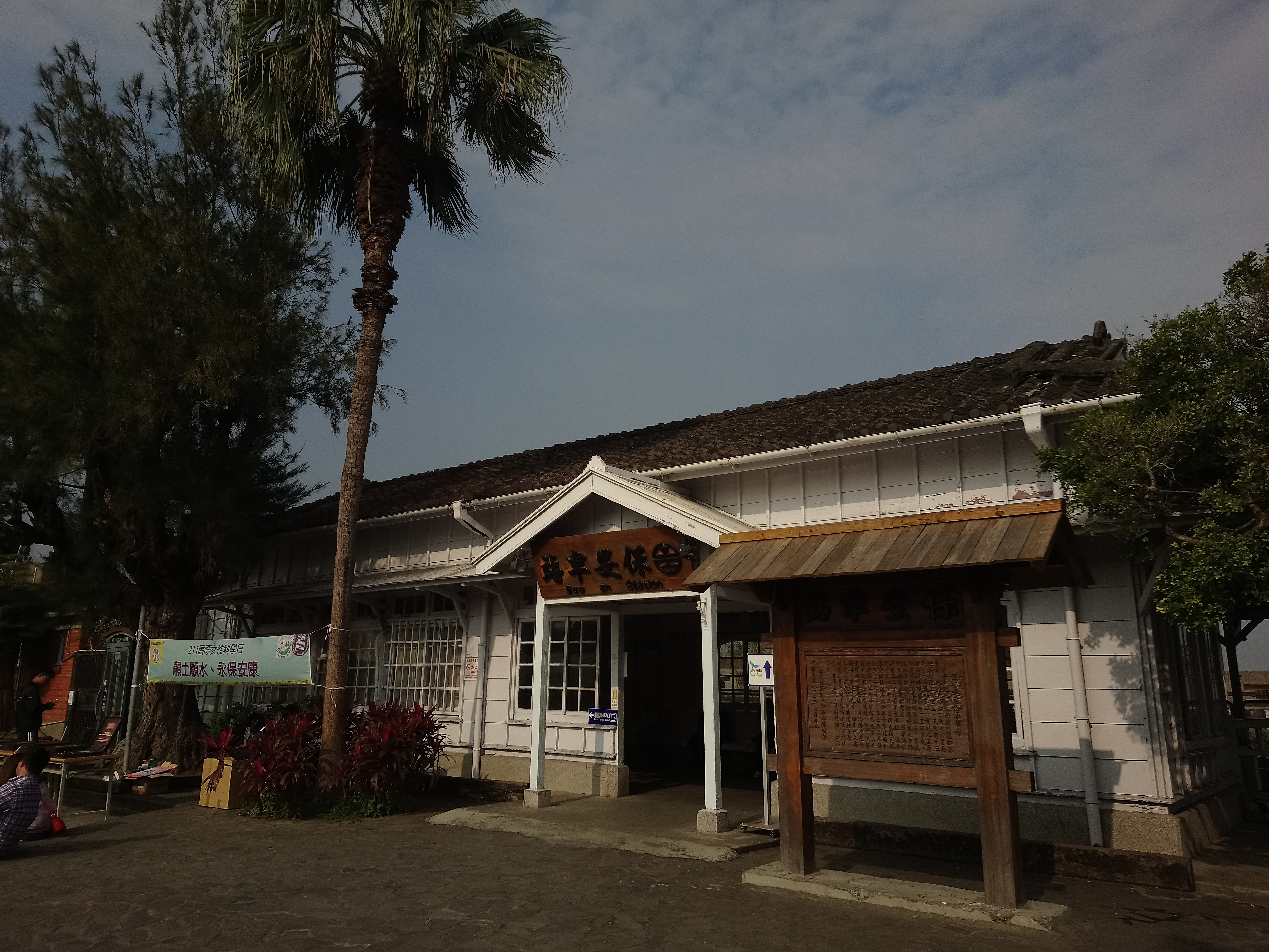 臺鐵保安車站,臺南市仁德區保安里